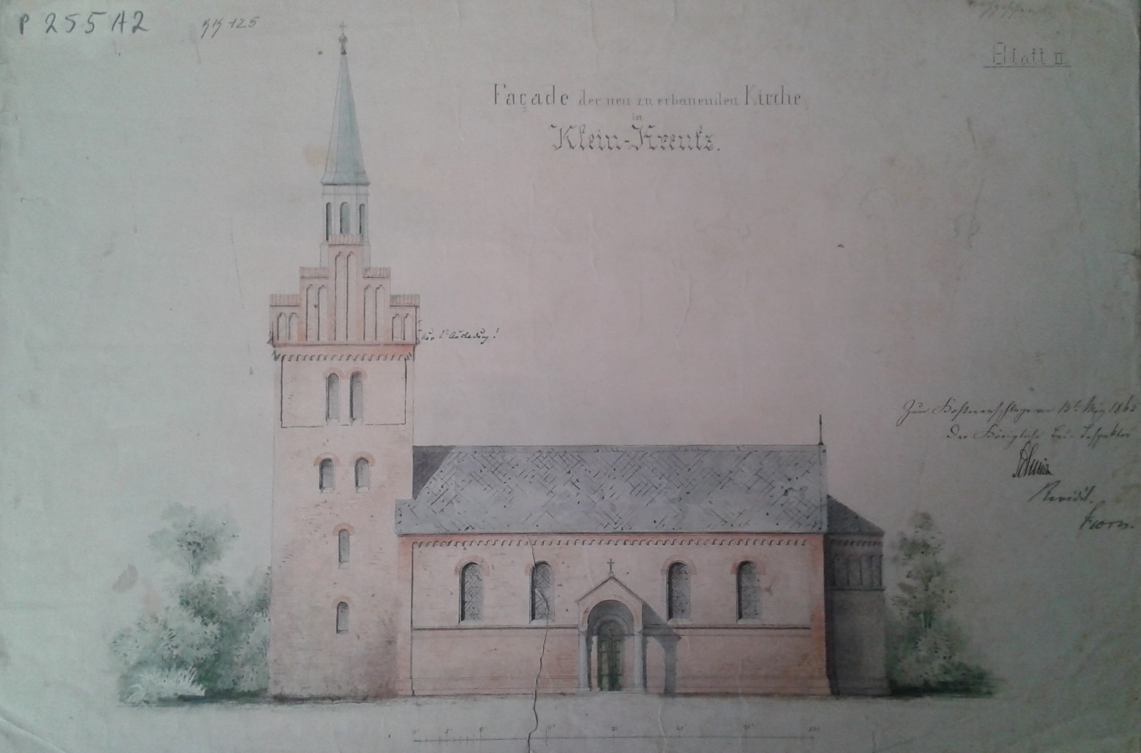 Fassadenzeichnung Kirche Klein Kreutz, Domstiftsarchiv Brandenburg, laut Inschrift 1865 entstanden